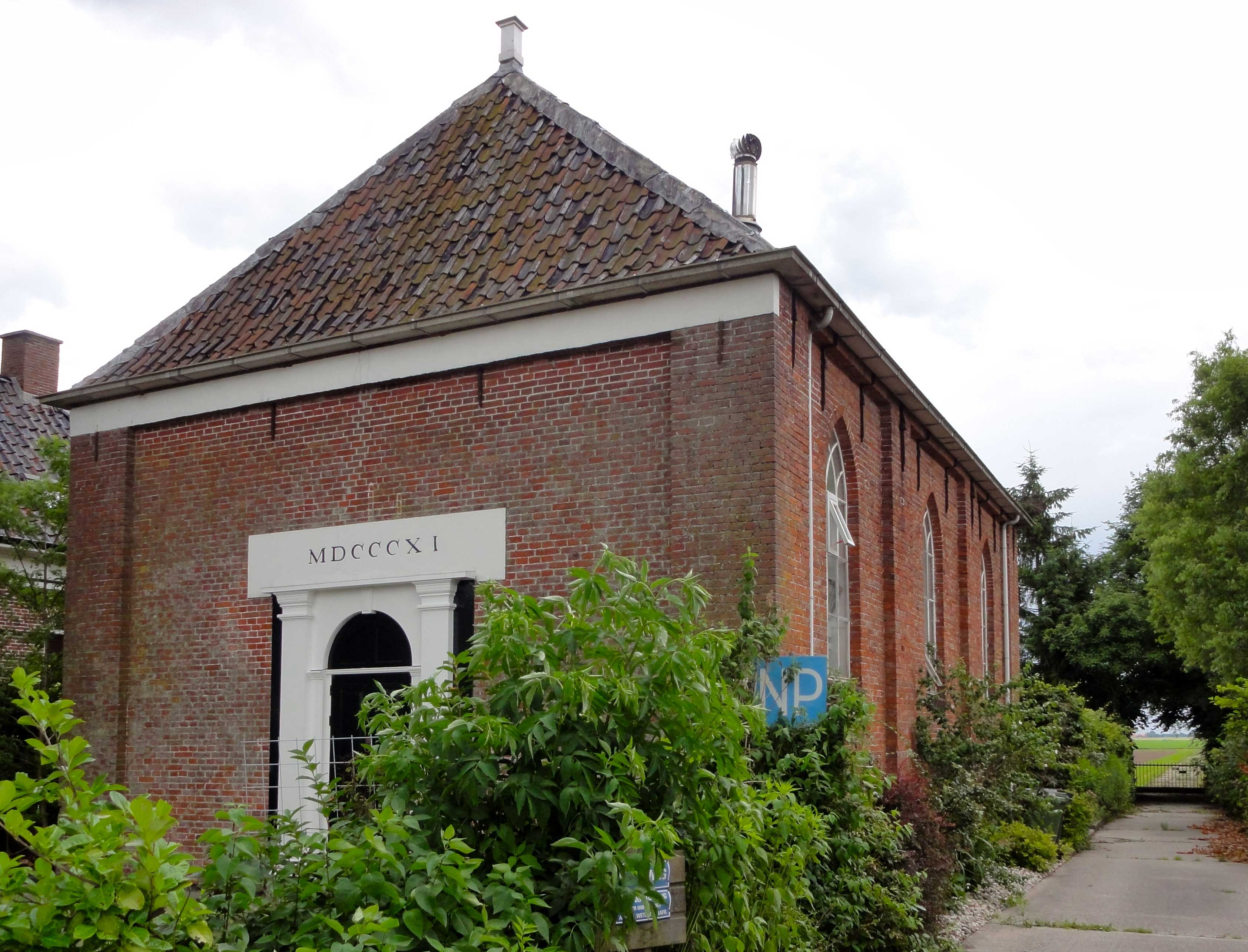 Voormalige doopsgezinde kerk (1811) Hoofdstraat 80 Noordbroek